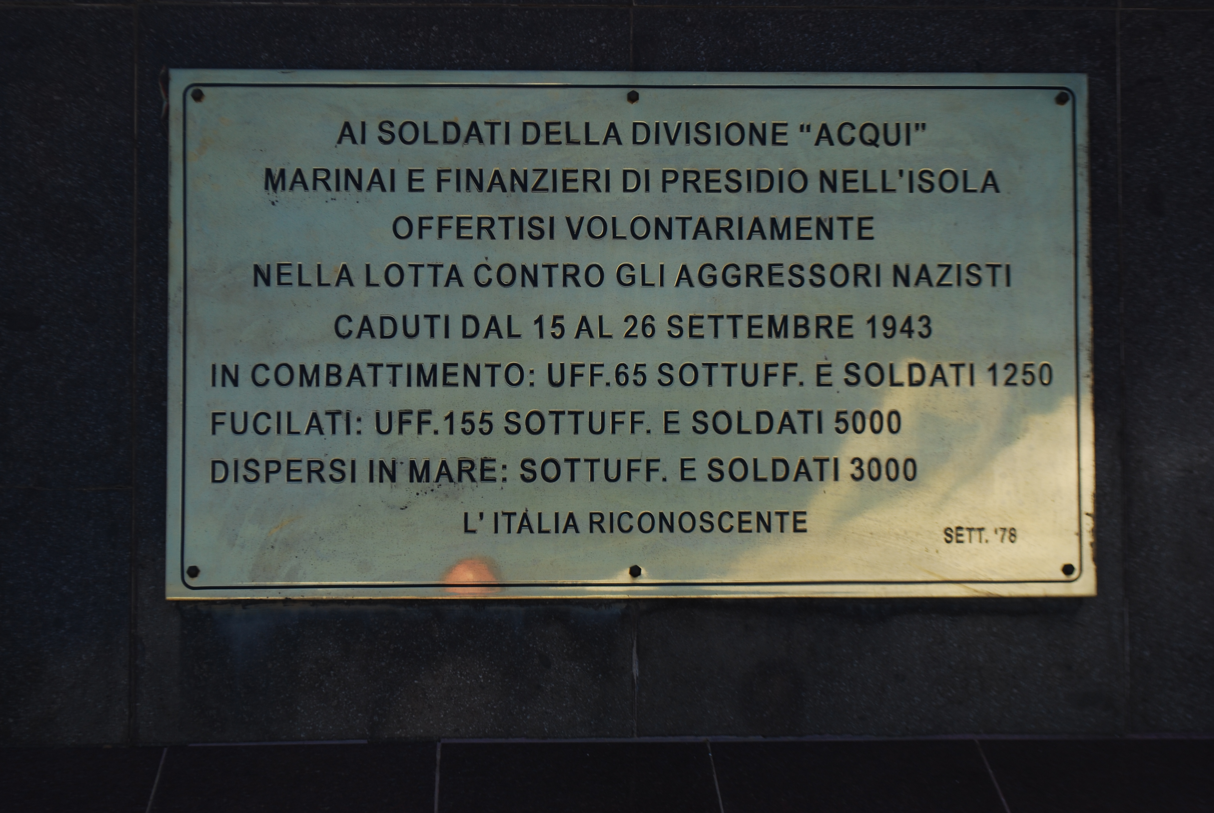 Vue d'Argostoli (Kefalonia).